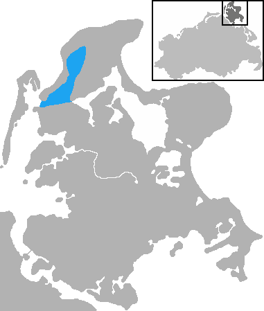 Mecklenburg-Vorpommern, Wieker Bodden Bay, near Wiek (marked blue)